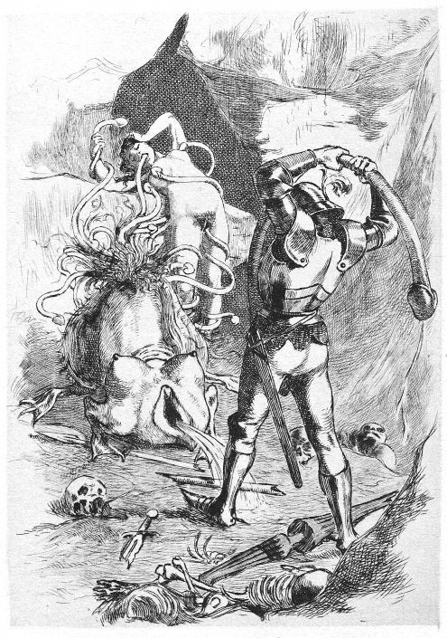 Dessins de Martin van Maele. Illustration de La Grande Danse macabre des vifs, 1905.